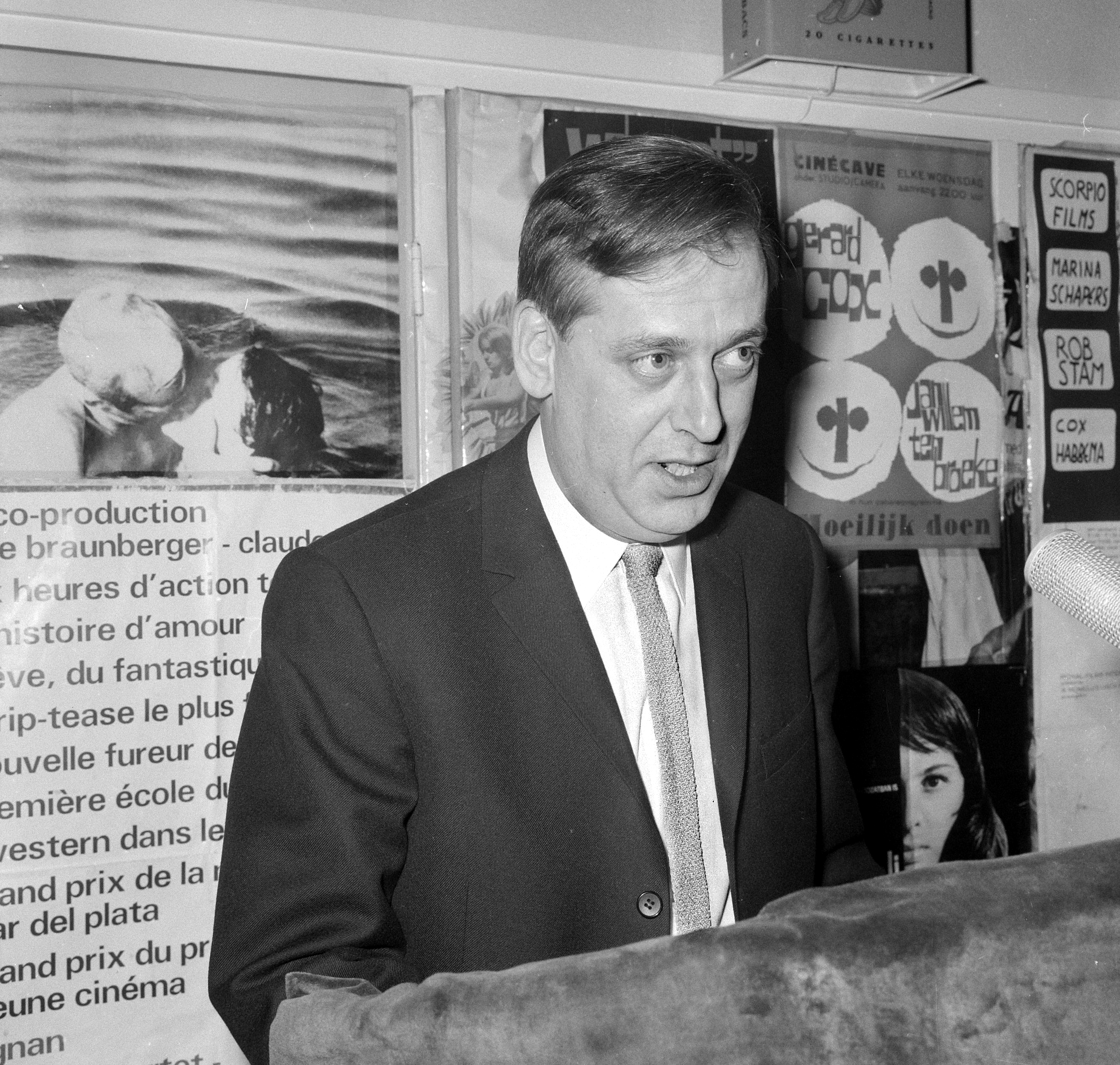 Graadt van Roggenprijs voor Jan Blokker , Jan Blokker, 1 februari 1966